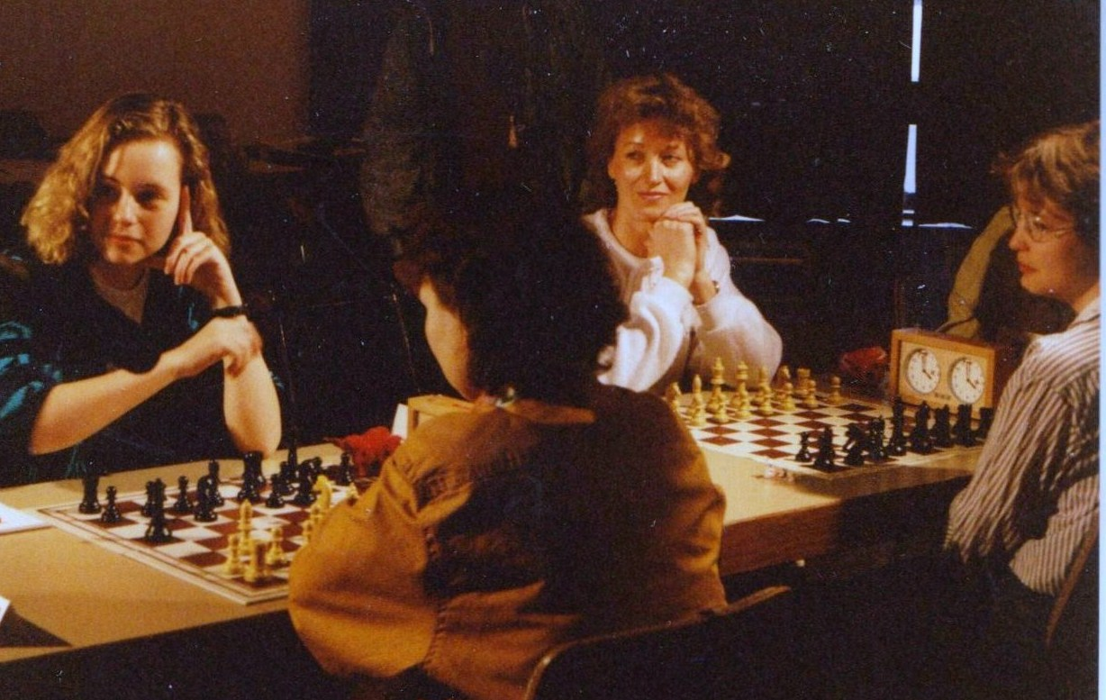 Thüringen - Sachsen (Bretter 1 und 2) bei der Deutschen Frauen-Mannschaftsmeisterschaft der Landesverbände 1991 in Braunfels. An Brett 1 spielt Anke Koglin für Thüringen mit Schwarz gegen Martina Beltz.